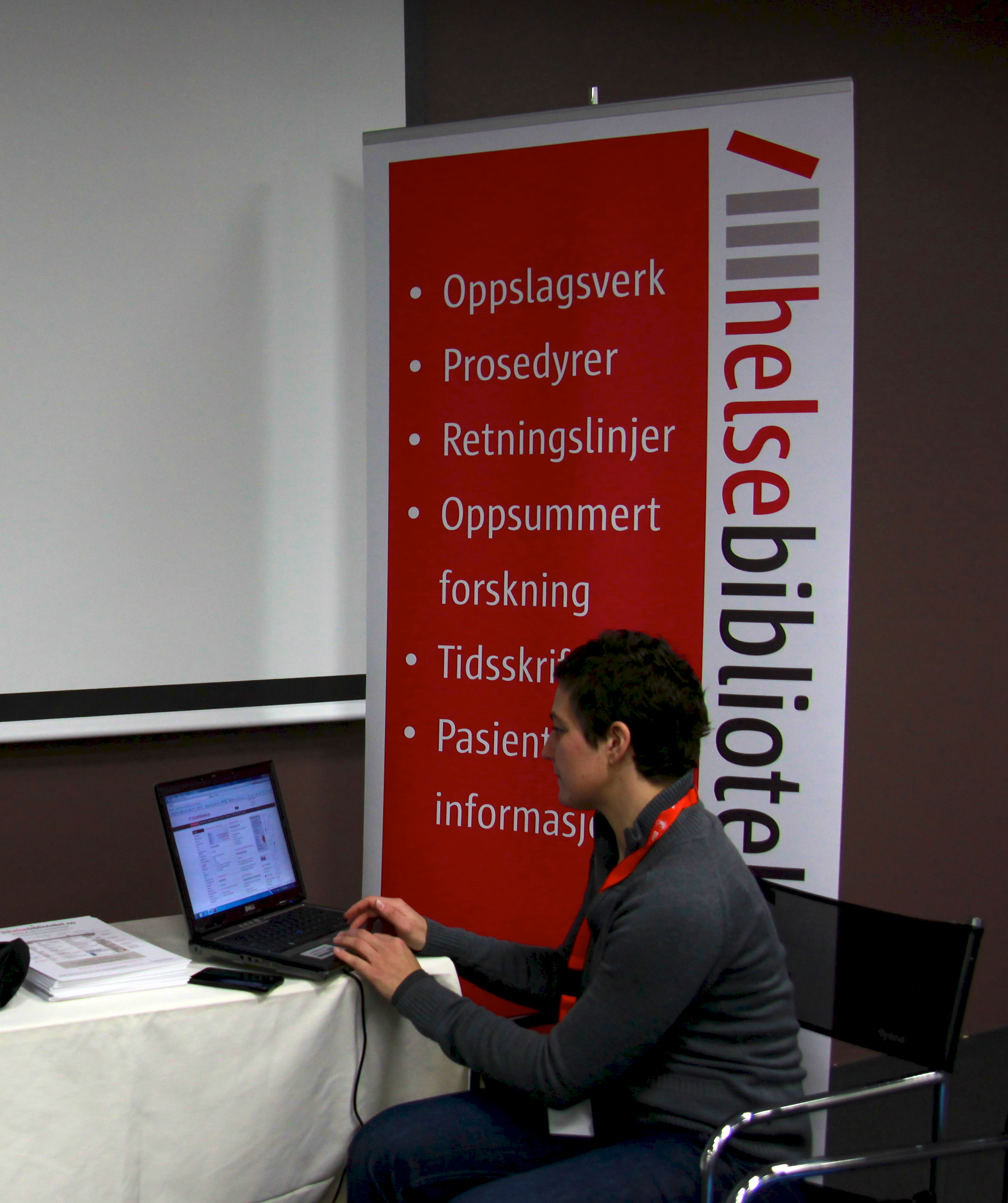 Helsebiblioteket på Farmasidagene 2011. With permission.